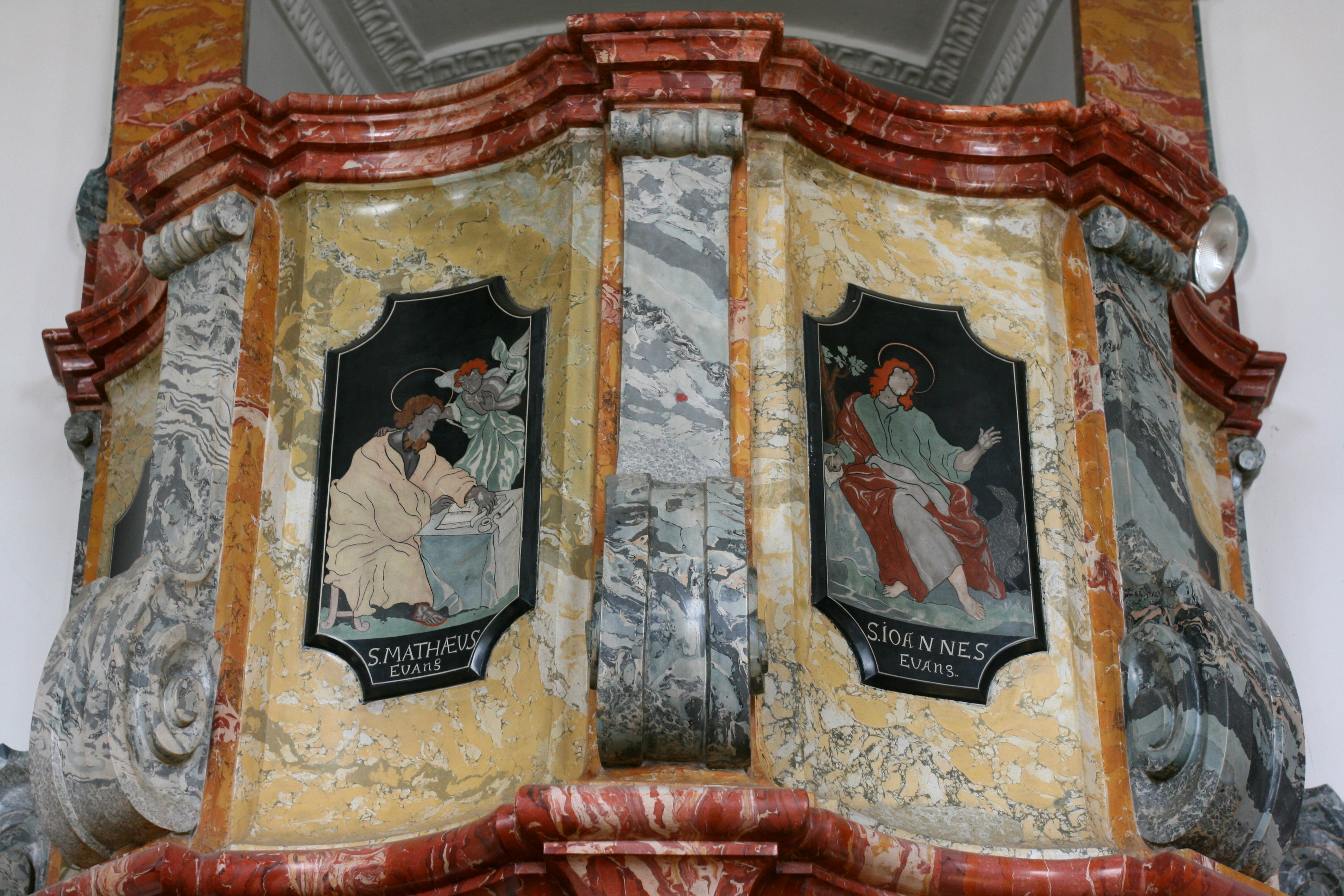 St. Martin-Kirche, Kirchstraße/Meersburger Straße in Ittendorf, Markdorf